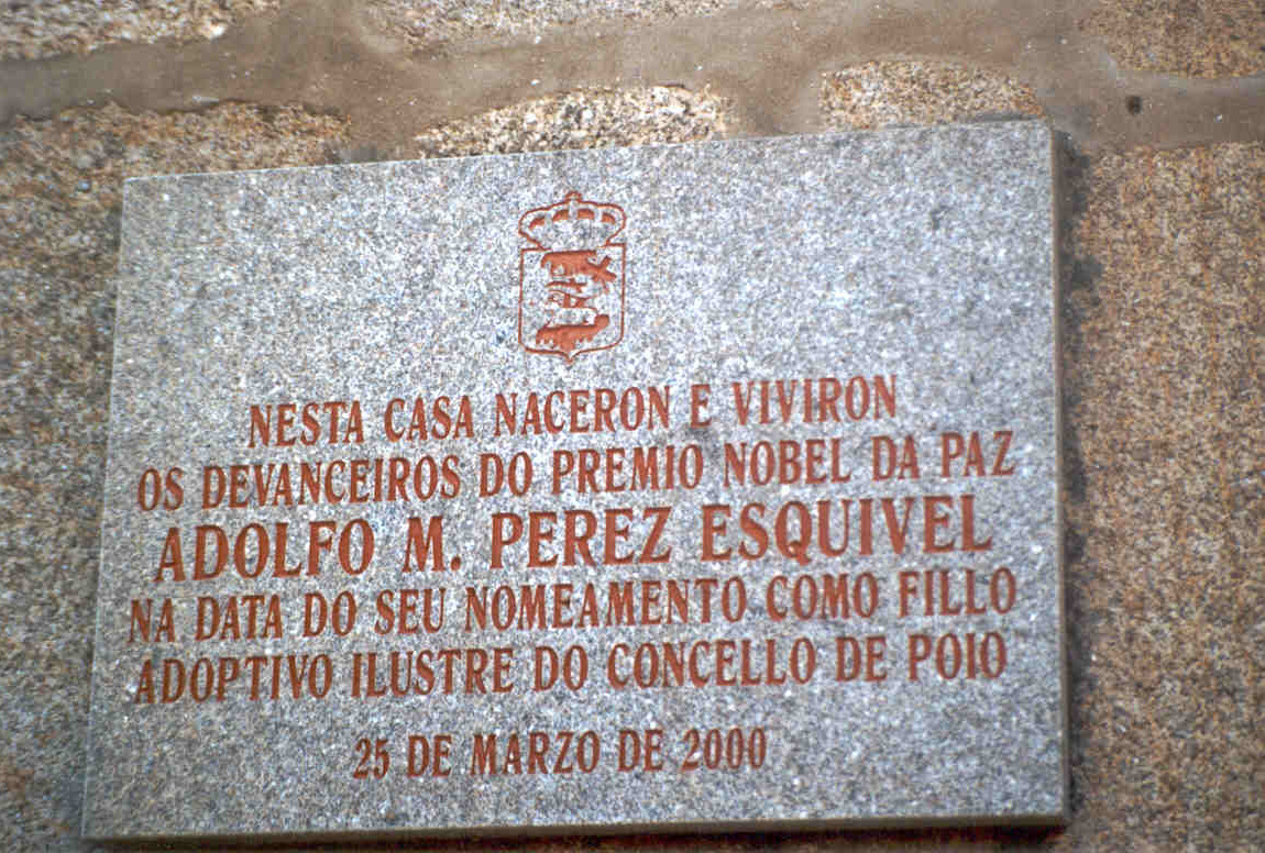 Declaración del Ayuntamiento de Poio nombrando a Adolfo M. Pérez Esquivel, premio Nóbel de la Paz, como hijo adoptivo de Poio.